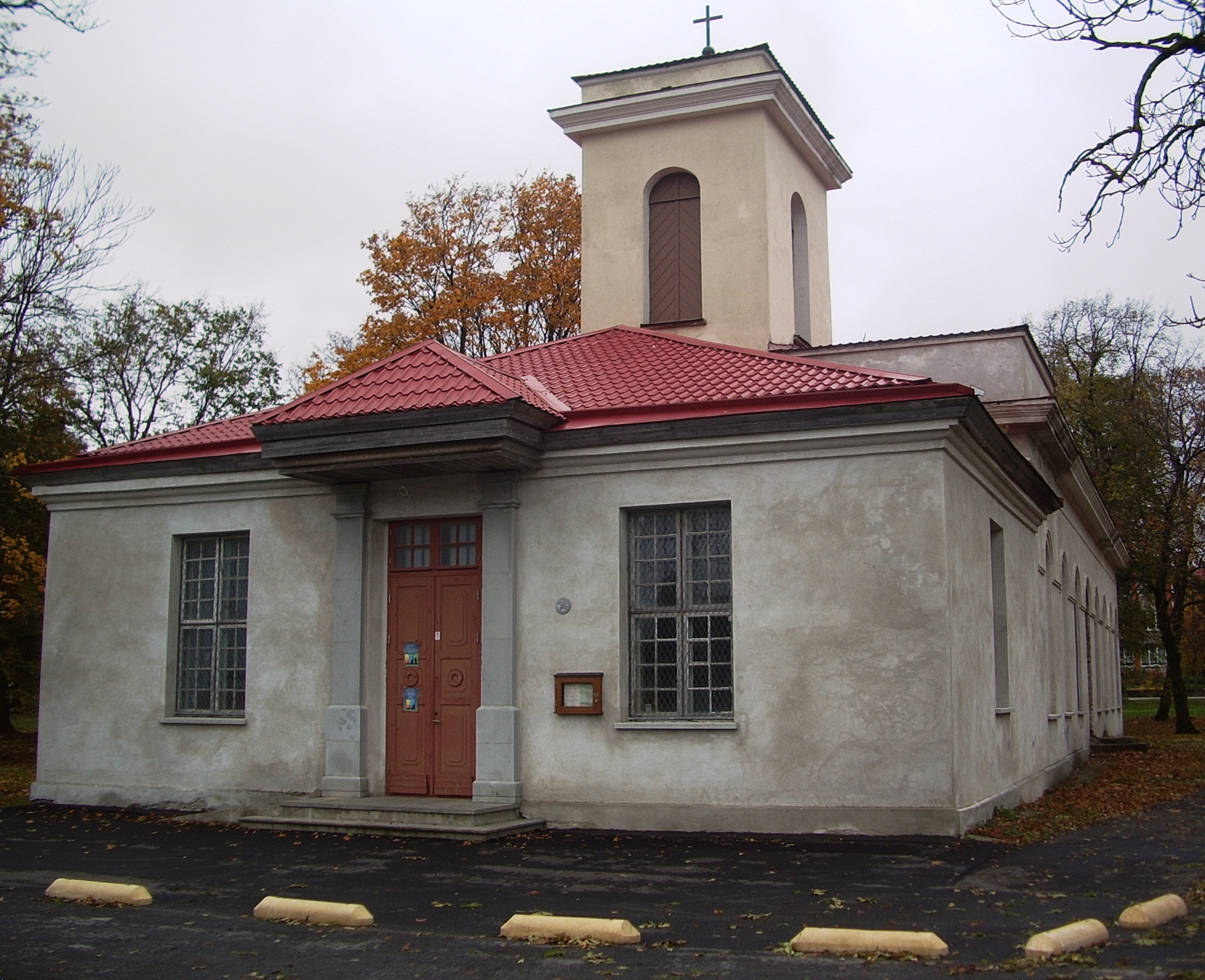 EELK Paldiski Nikolai kirik, Mere 12